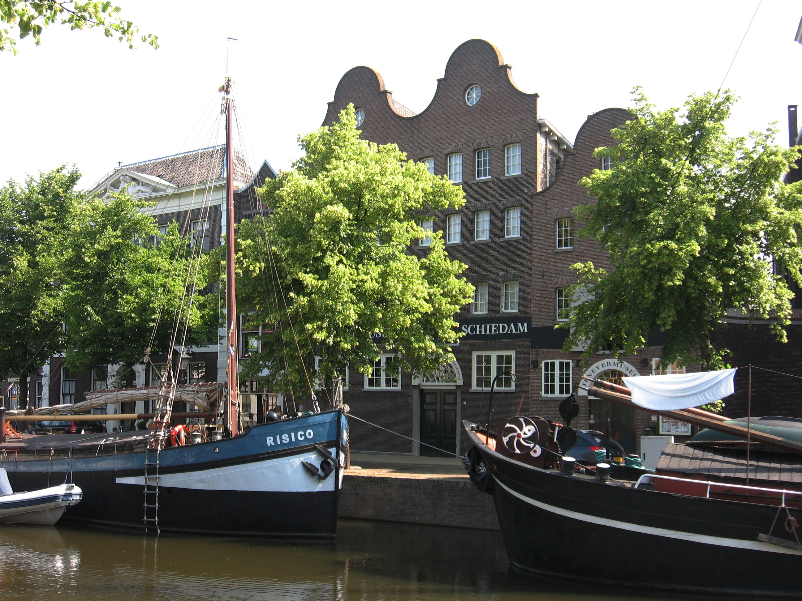 Schiedam - Lange Haven 76, rijksmonument, met de RISICO voor de deur.